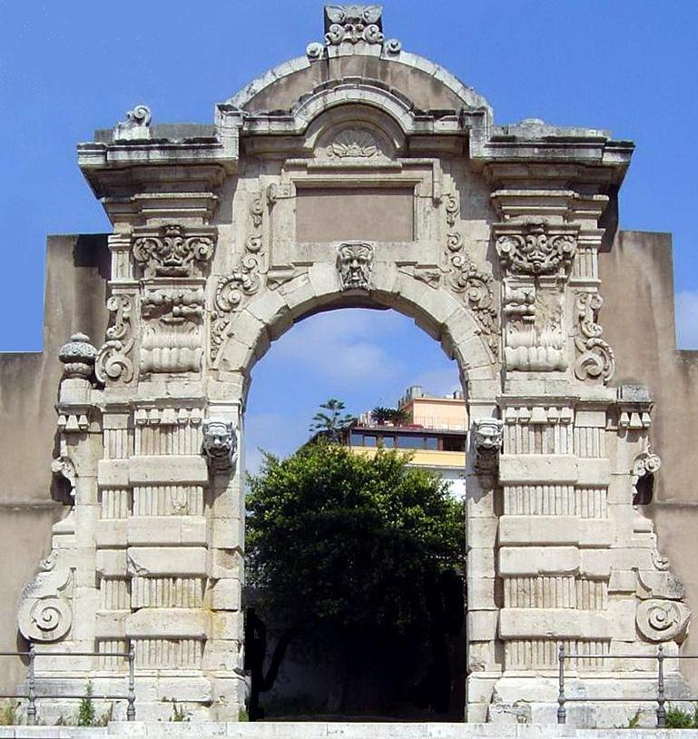 Porta Grazia (Domenico Biundo and Antonio Amato)